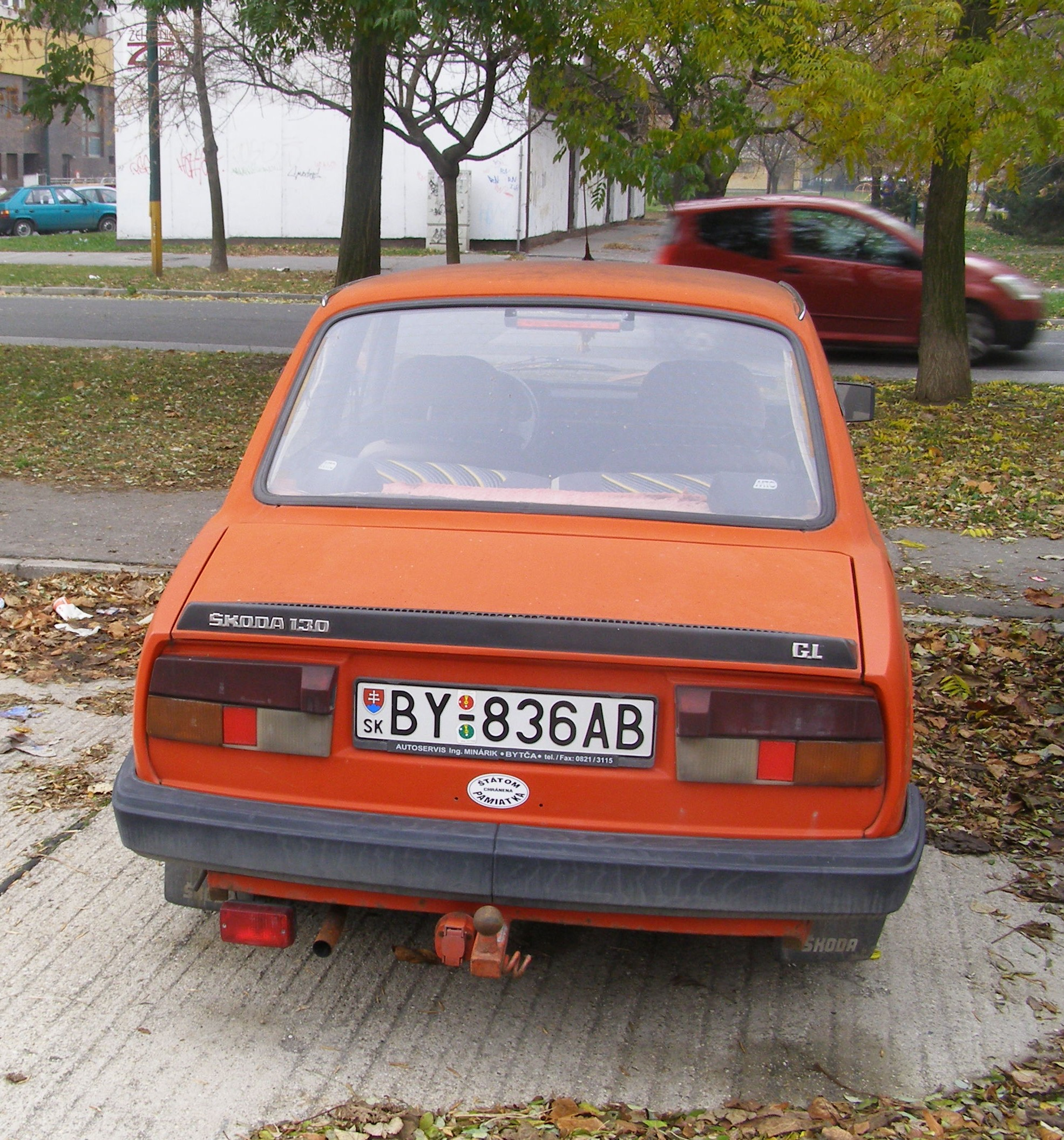 Škoda 130 GL in Bratislava